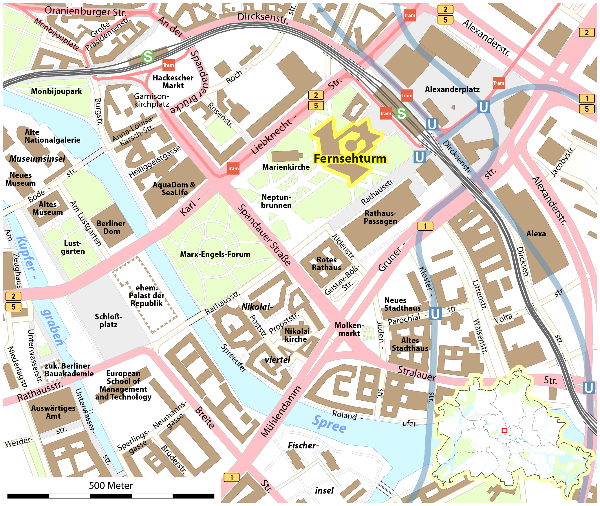 Lagekarte des Fernsehturms in Berlin This map may be incomplete, and may contain errors. Don't rely solely on it for navigation.